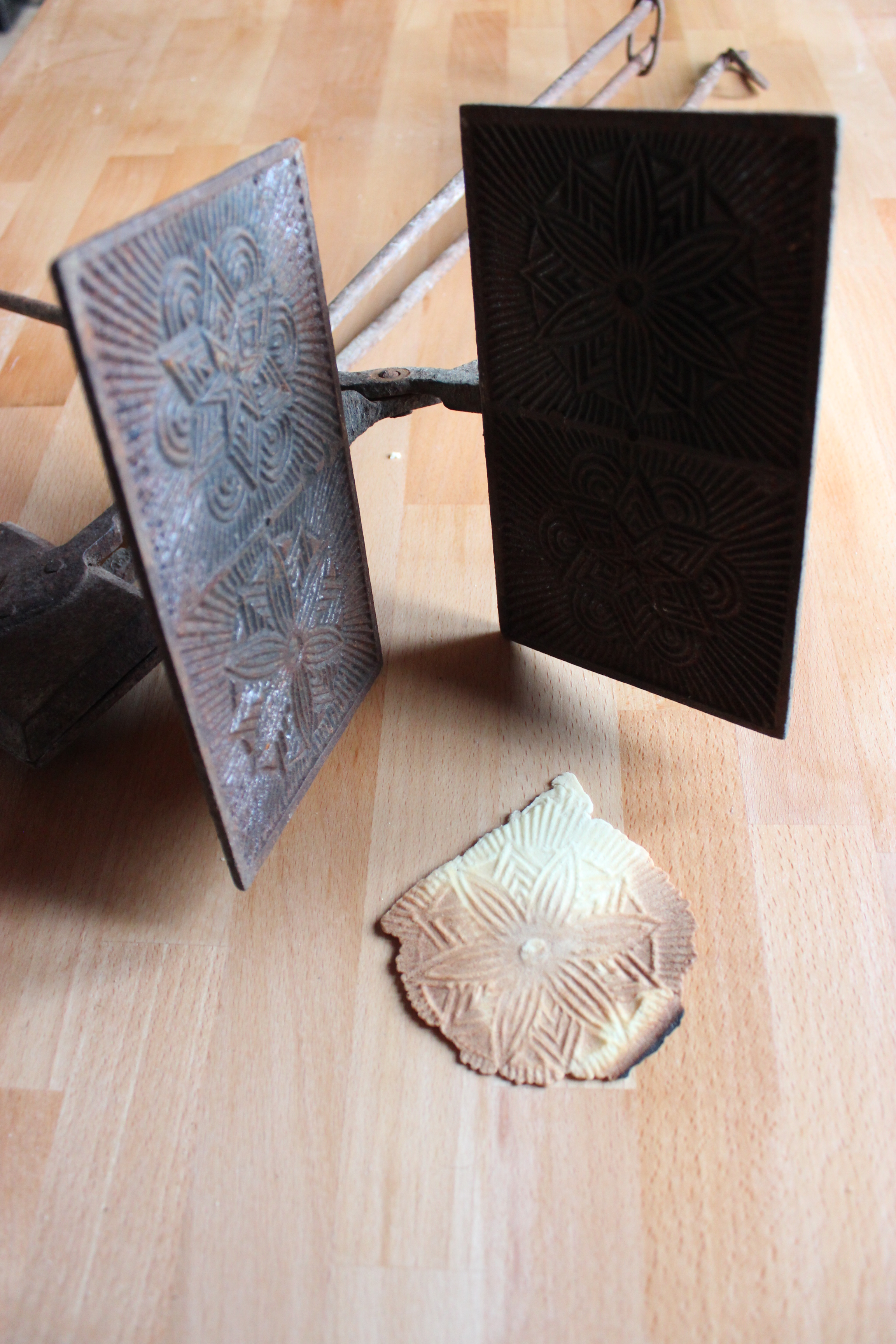 Deux vieux moules à cène et une cène moulée